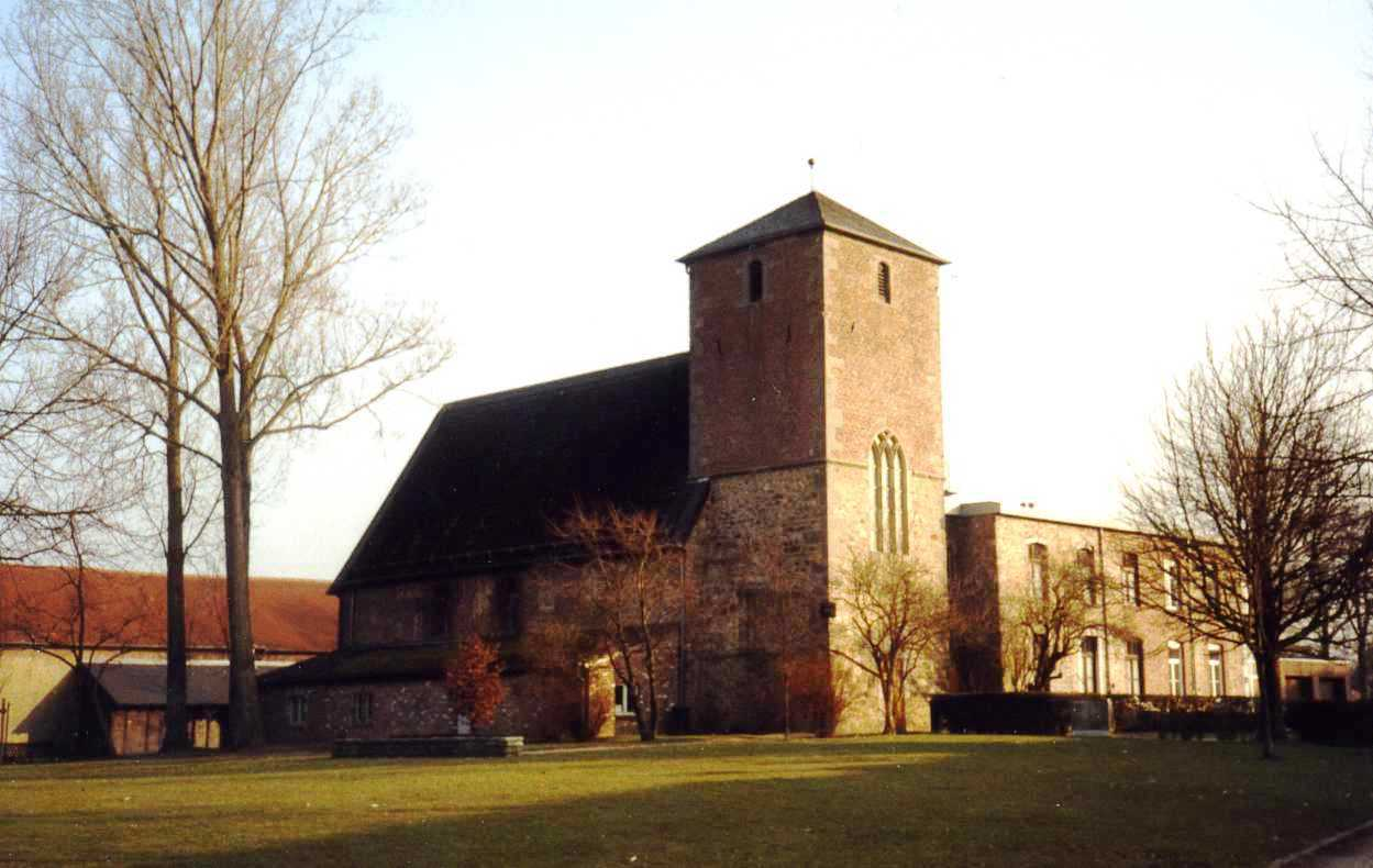 Kulturzentrum Sankt Jöriser Klosterkirche